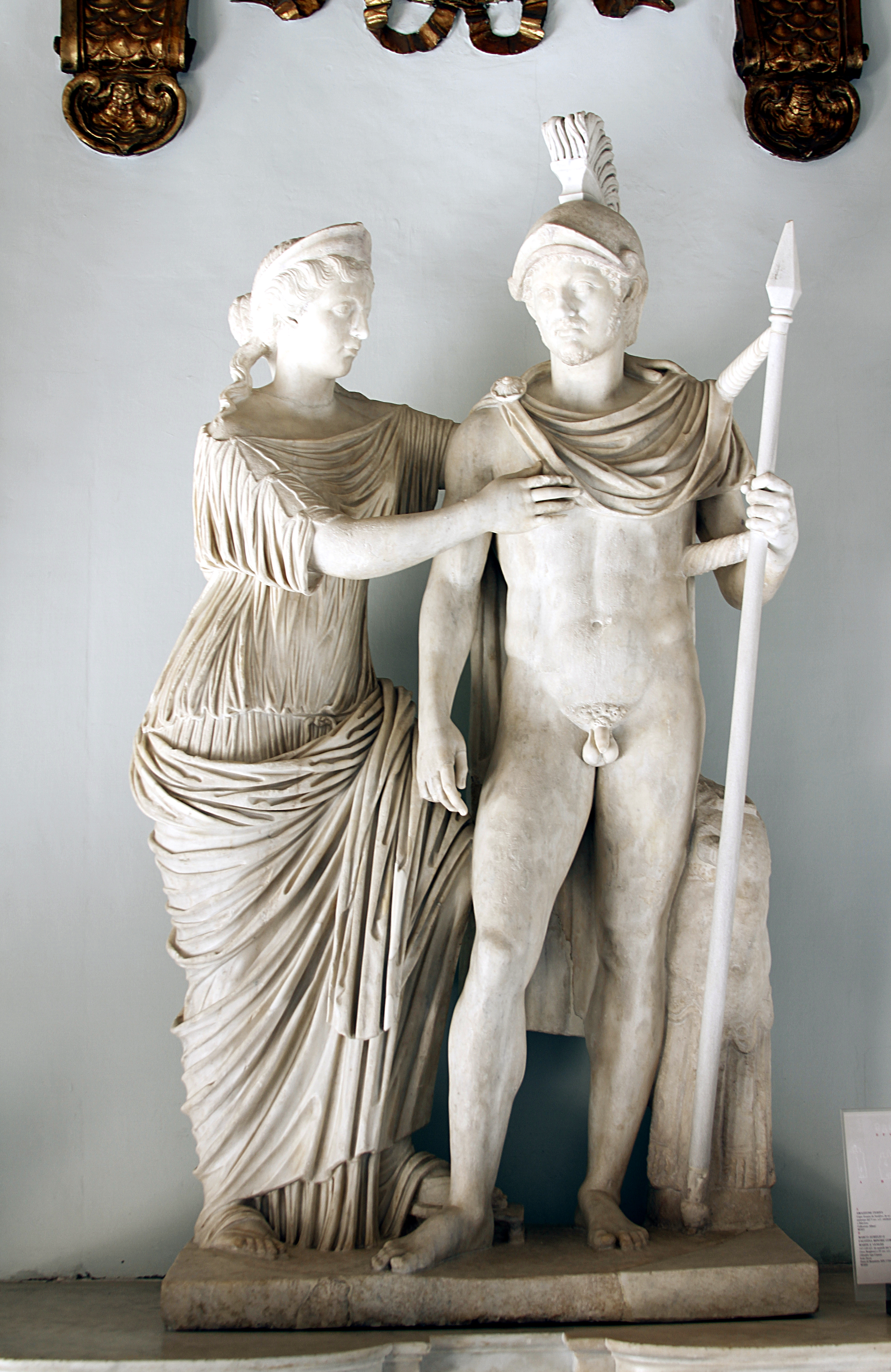 Palazzo Nuovo - Musei Capitolini - Rome